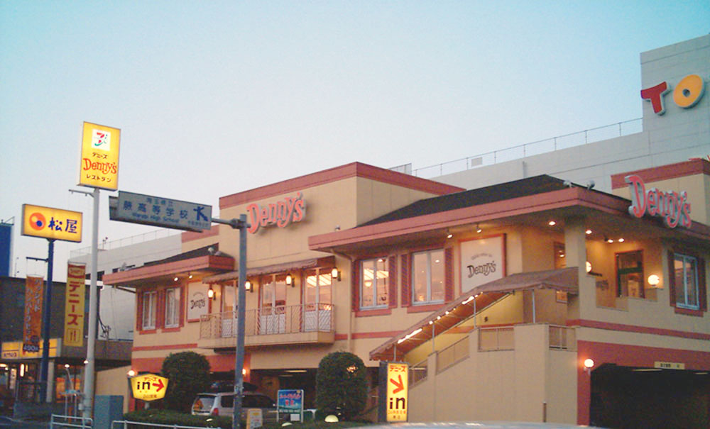 デニーズ蕨店。埼玉県蕨市北町5丁目4-3。中仙道沿い。